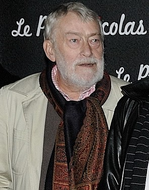 Avant-première du film Le Petit Nicolas au Grand Rex, à Paris, le 20 Septembre 2009, en présence de toute l'équipe de film. Ici, Michel Duchaussoy.